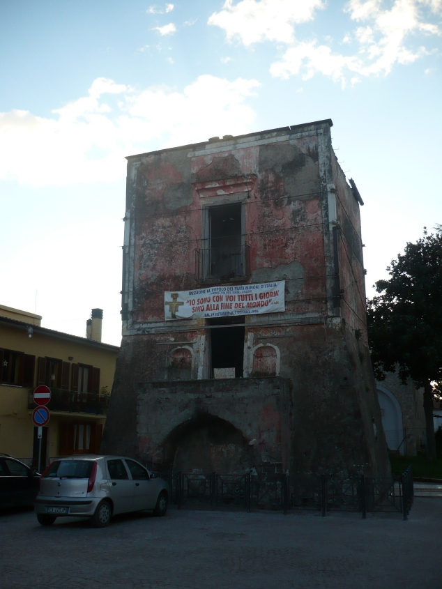 Torre in piazza Compasso, parte di un'abitazione più grande. Licensing Categoria:Immagini esclusivamente in GNU FDL